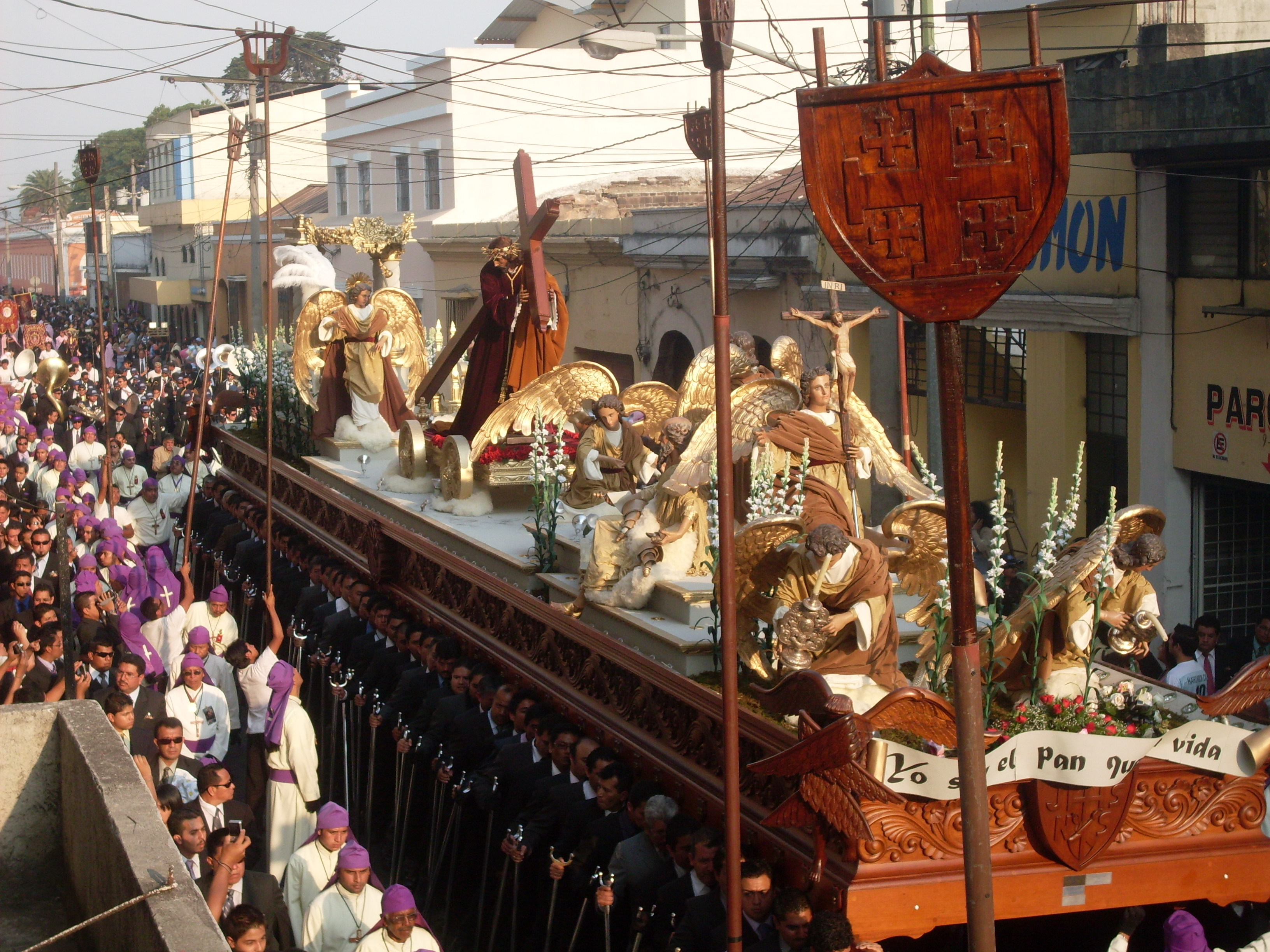 Procesión de Jesús Nazareno del Consuelo, Templo de La Recolección en el Centro histórico de Nueva Guatemala de la Asunción, en su anda o mueble procesional de 110 cargadores por turno, con una procesión de 14 horas de duración